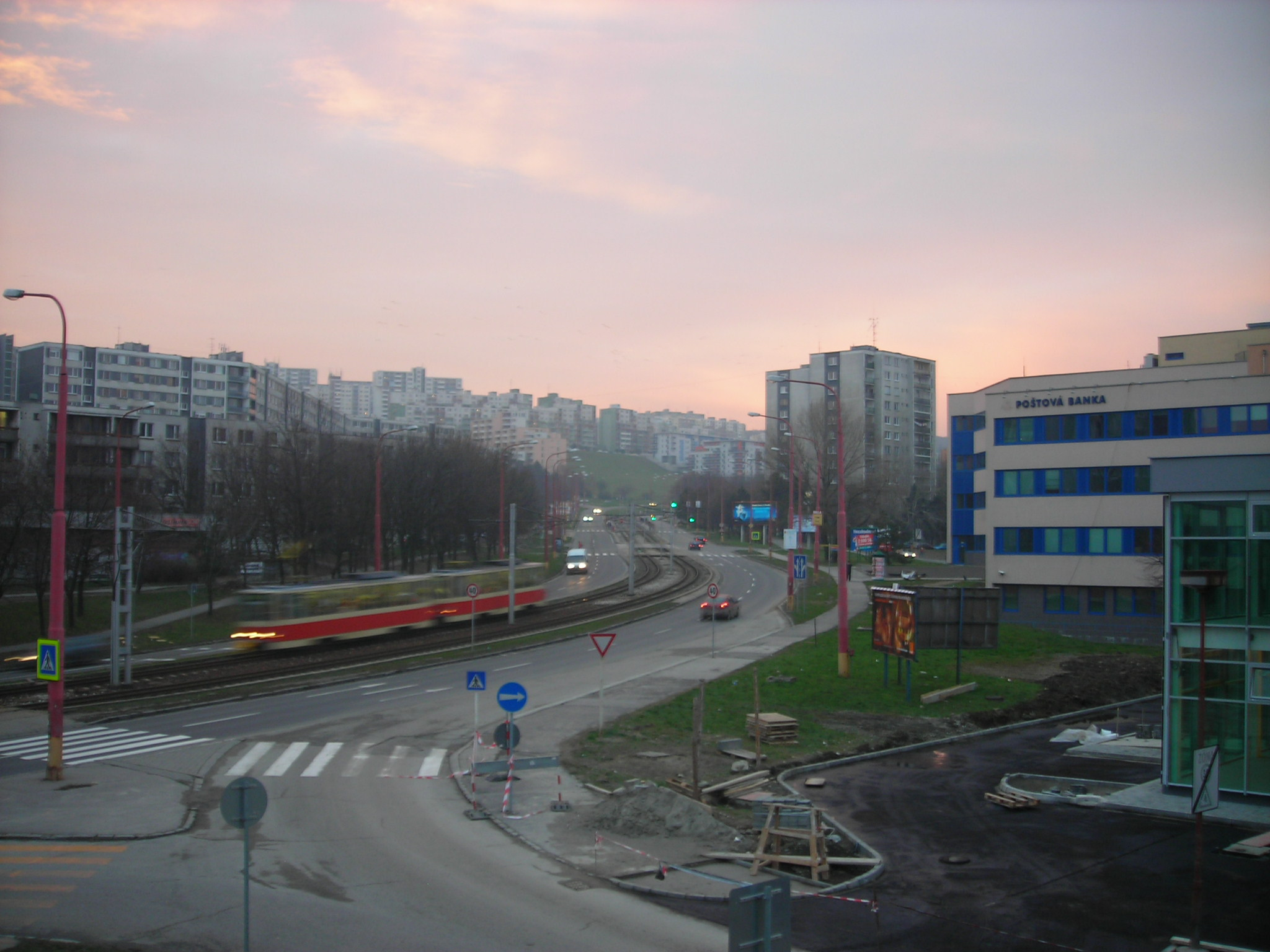 obytný súbor Karlova Ves